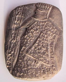 Replik einer Tontafel mit Keilschrift, vermutlich eine Gesetzestafel des Königs Hammurabi, Vorderseite, Größe 5 x 7,5 cm